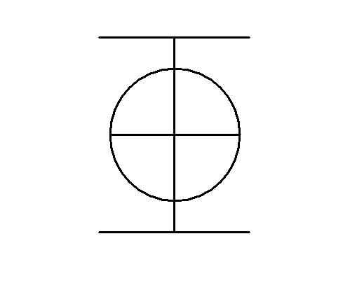 中文（台灣）: 南瓜棋棋盤